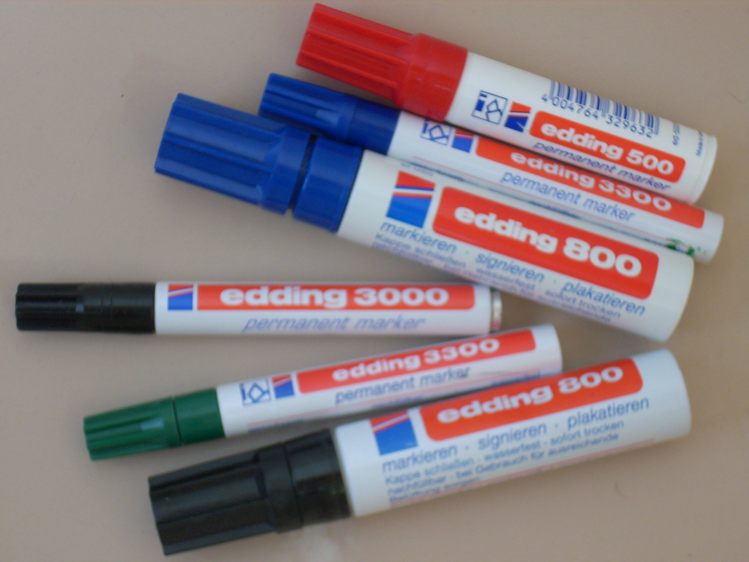 Eddingstifte, Modelle 3000, 3300, 500, 800